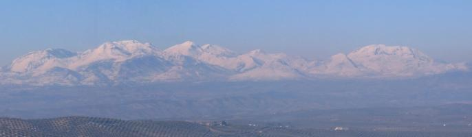 panorámica de Sierra Mágina nevada vista desde Cazorla -- Juan Diego Cano Cavanillas.